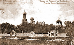 Михайлов Погост на открытке начала ХХ века